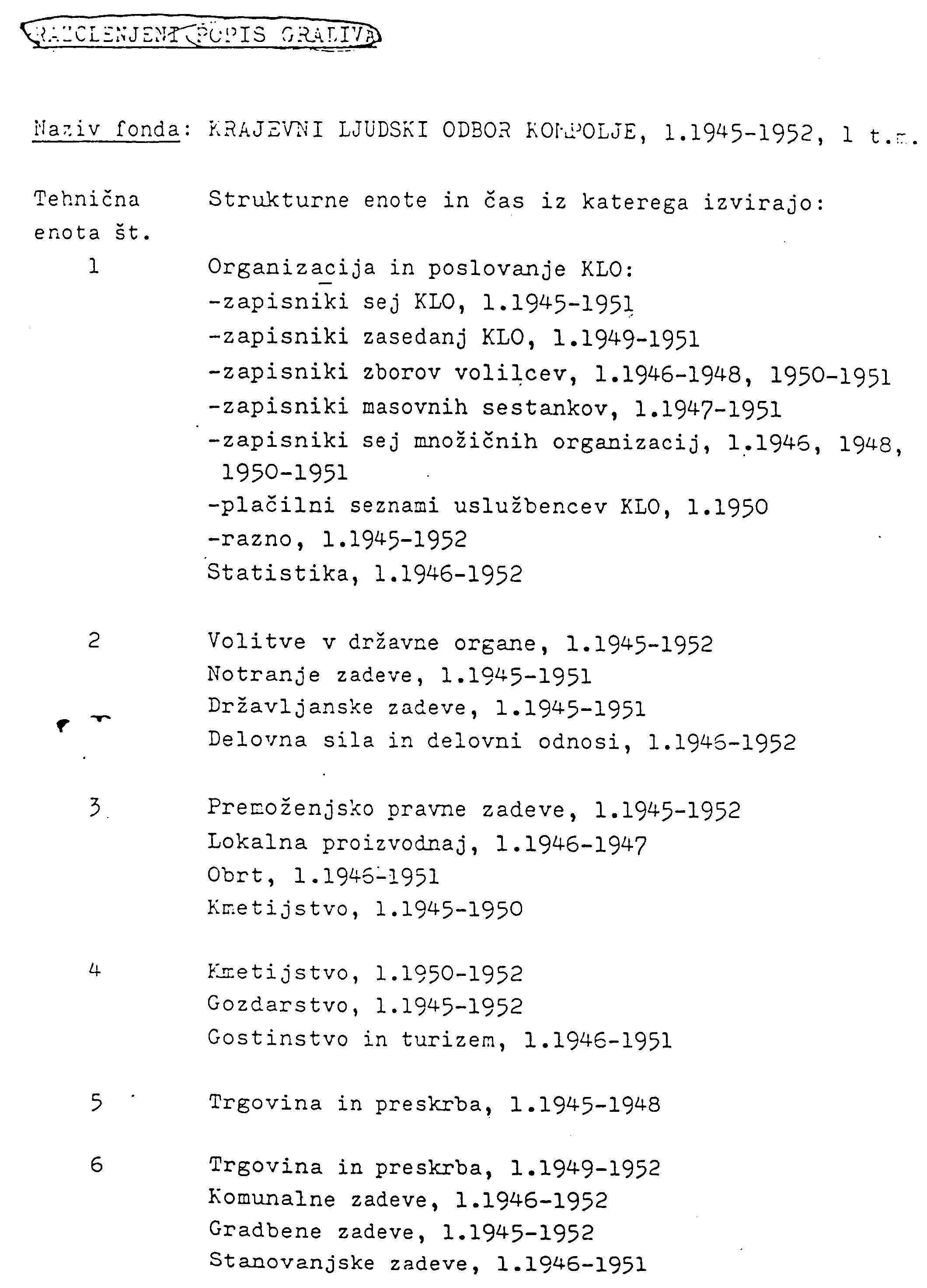 Arhivski popis za Krajevni ljudski odbor Kompolje. Obdobje 1945-52, 1 tekoči meter. Posamezna tehnična enota vsebuje določeno gradivo.